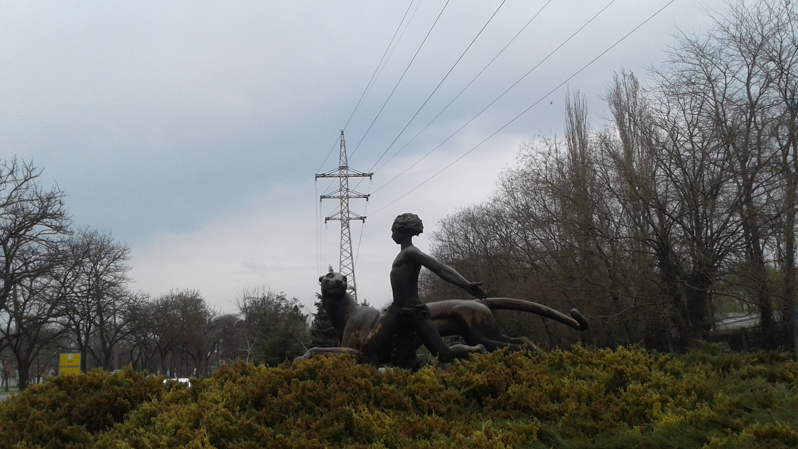 Високовольтна лінія біля миколаївського зоопарку